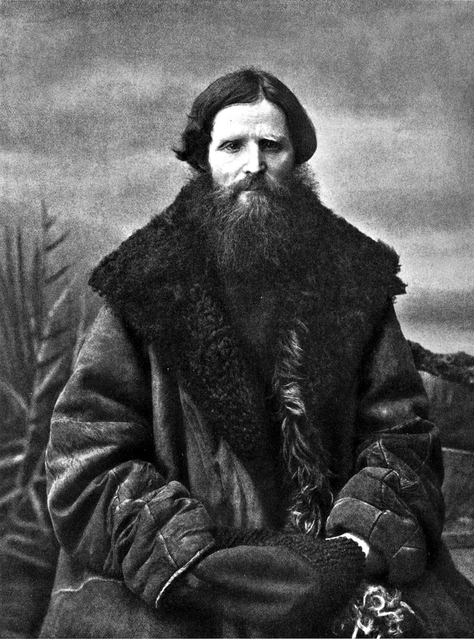 Мужчина в овчинном тулупе. Фото 1900-х гг.